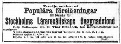 Tidningsannons vid Stockholmutsällningen 1897 föreläser Thor Stenbeck